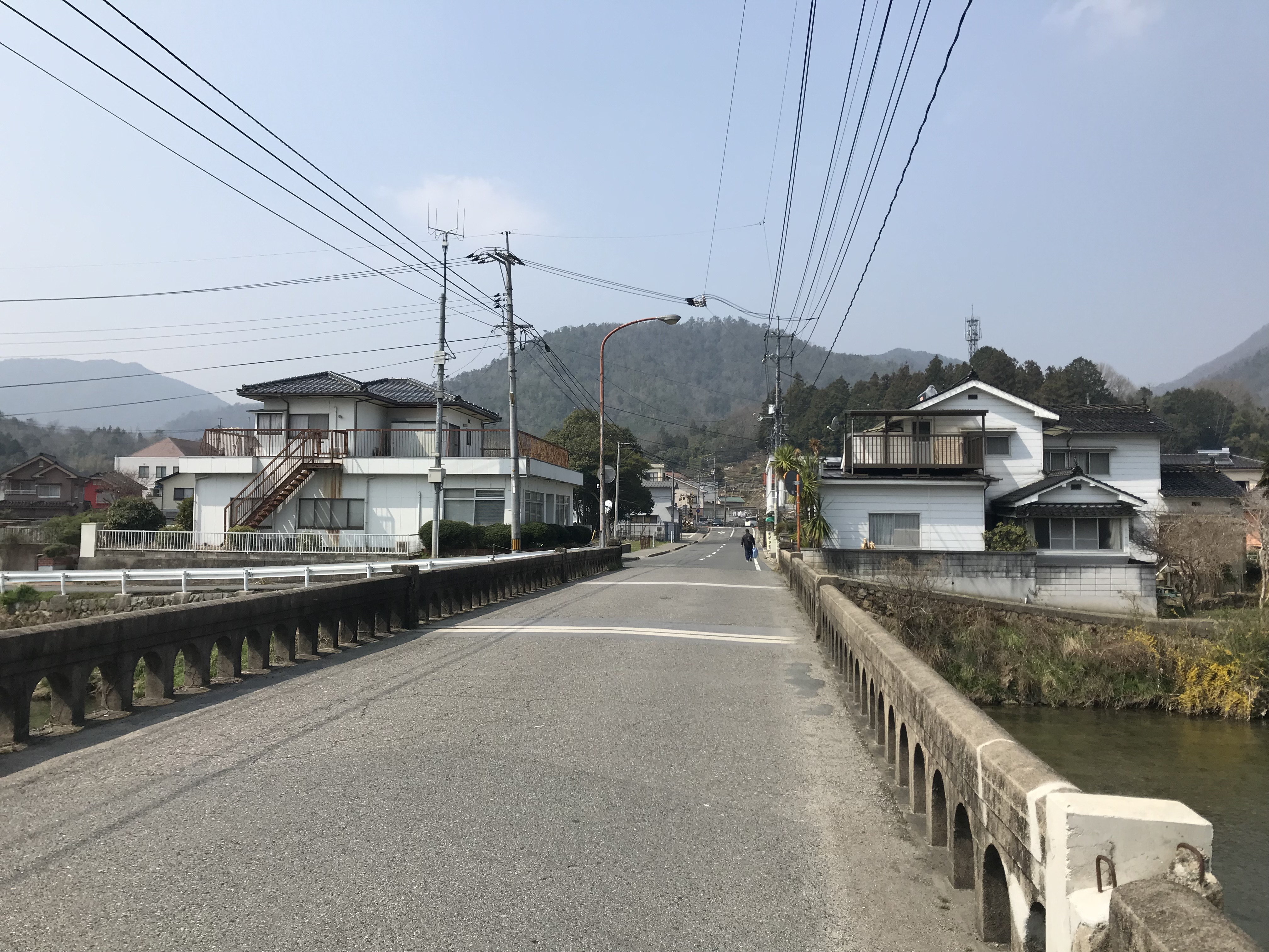 三篠川に架かる柏木橋